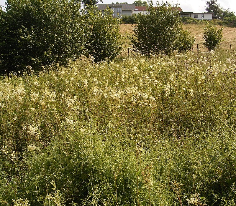 Filipendula ulmaria